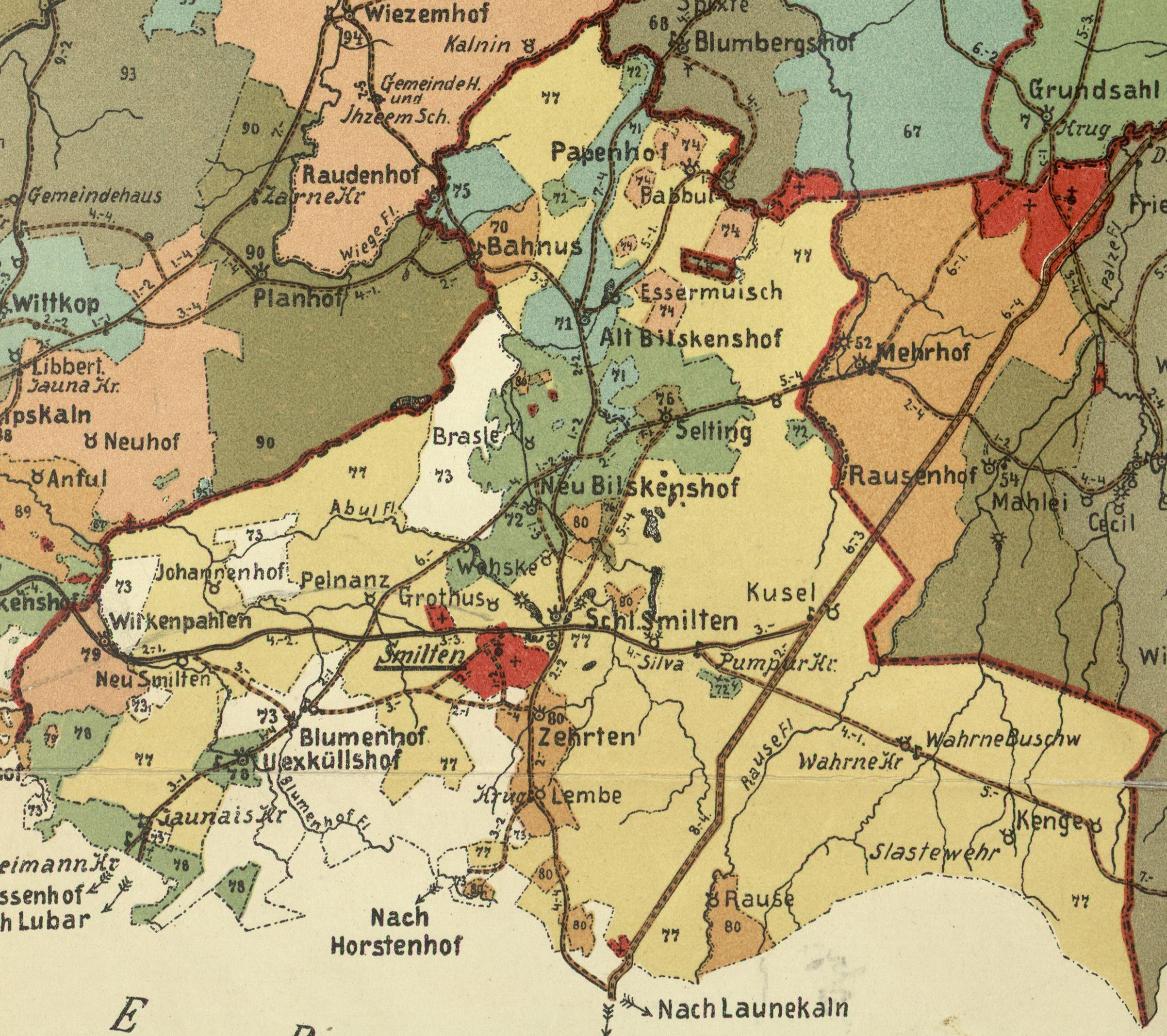 Smiltene kihelkonna mõisad 1904. aasta kaardil.